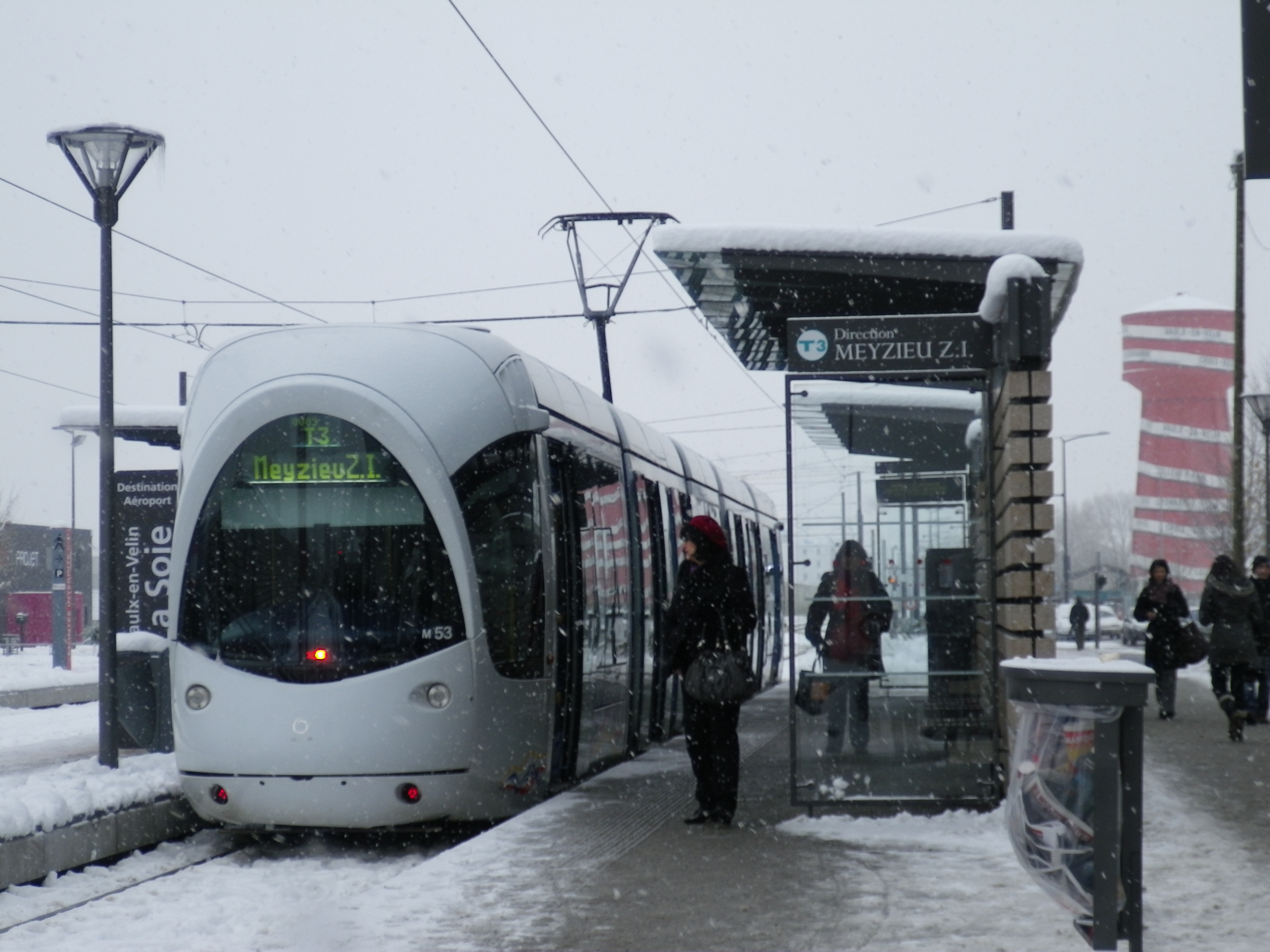 La rame 53 sur la ligne de tramway T3, à quai à la station Vaulx-en-Velin La Soie.Pentax Optio H90